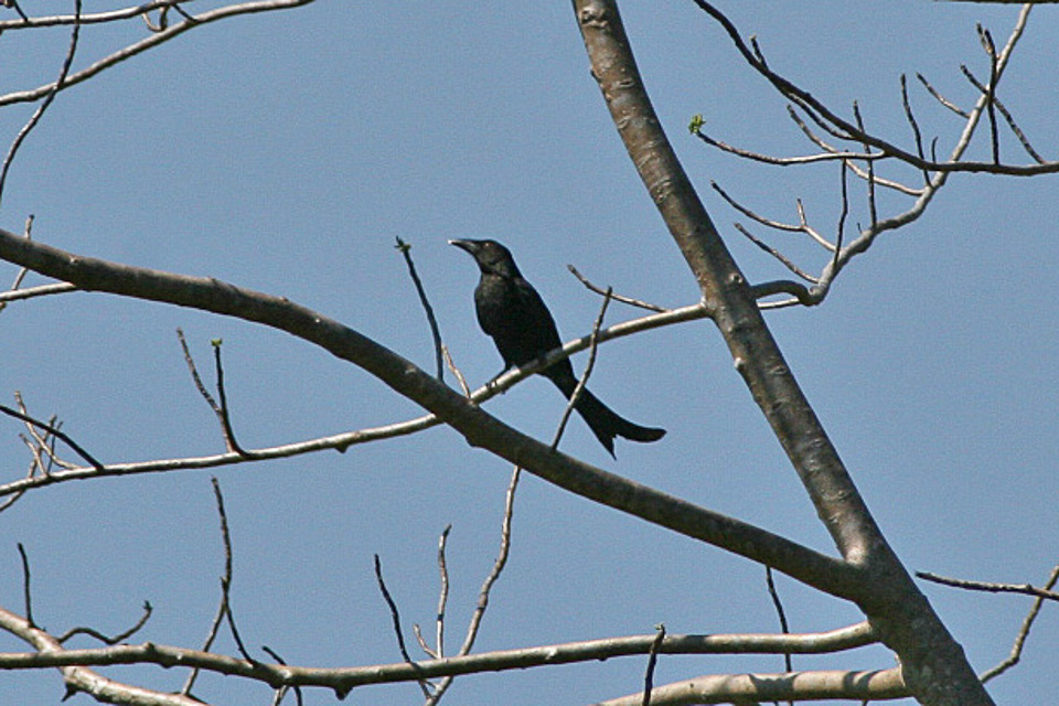 West Timor